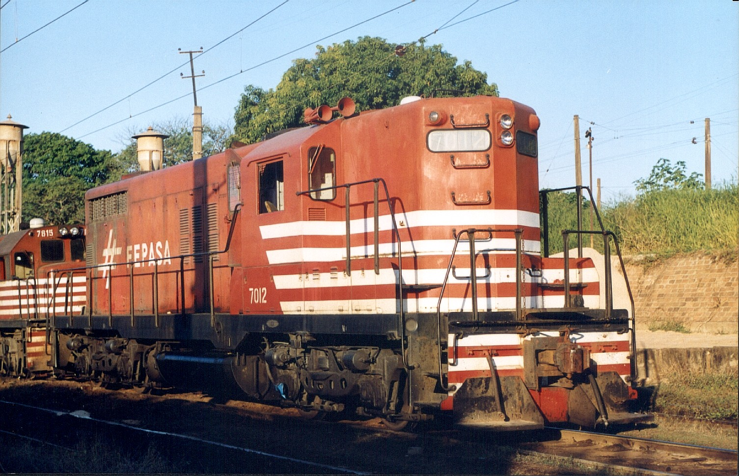 FEPASA 7012, GM GP18 Triagem Pta-Bauru-SP-Brasil